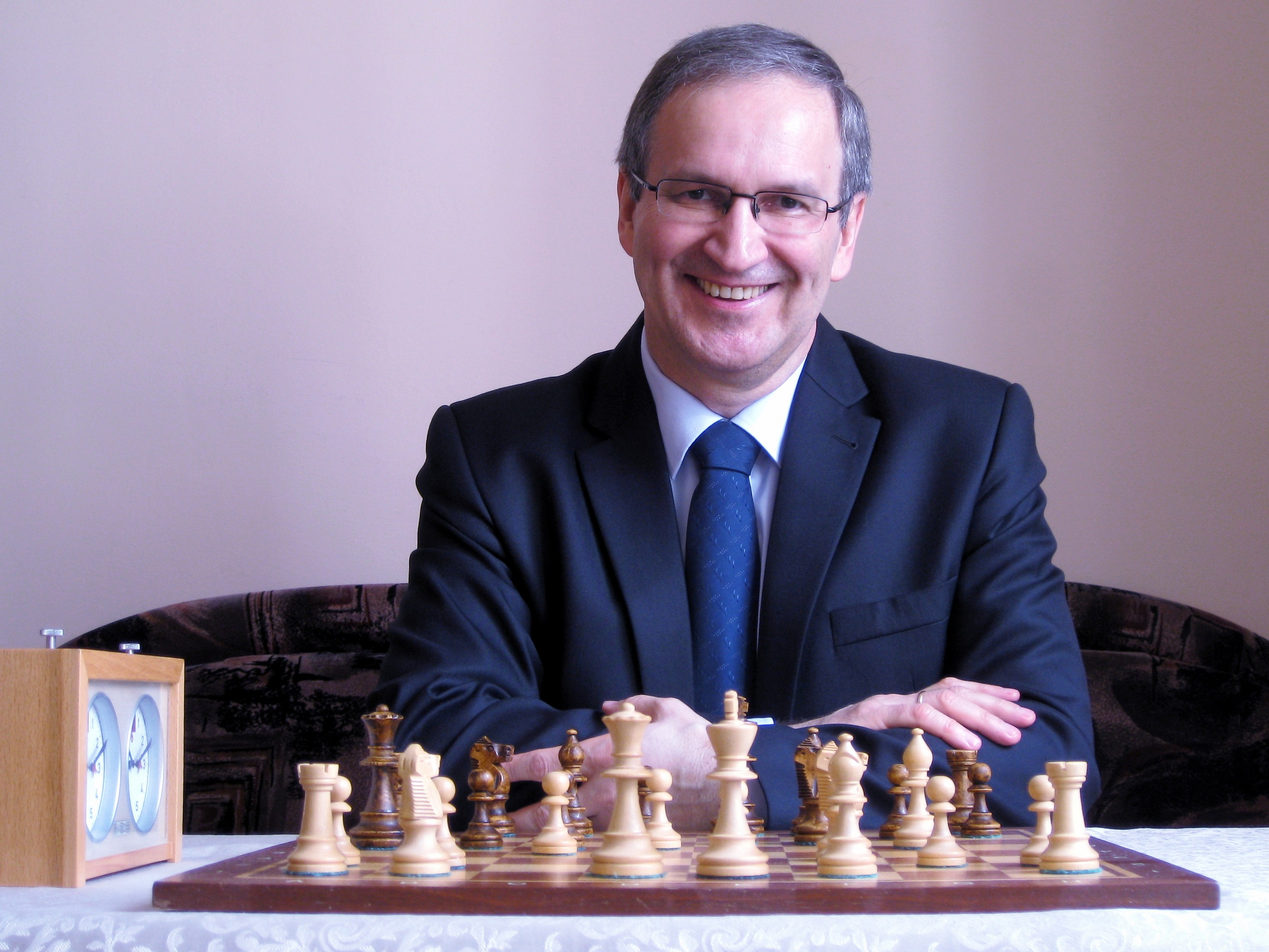 Mistrz międzynarodowy Jan Przewoźnik, Gorzów Wielkopolski 2014.